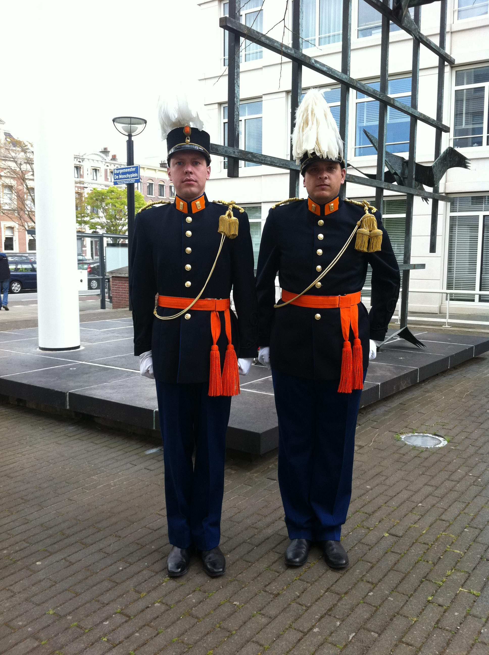 Pro Libertate bij het Irenemonument op 8 mei 2015